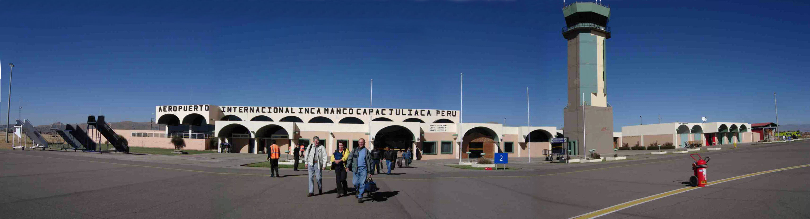 SPJL